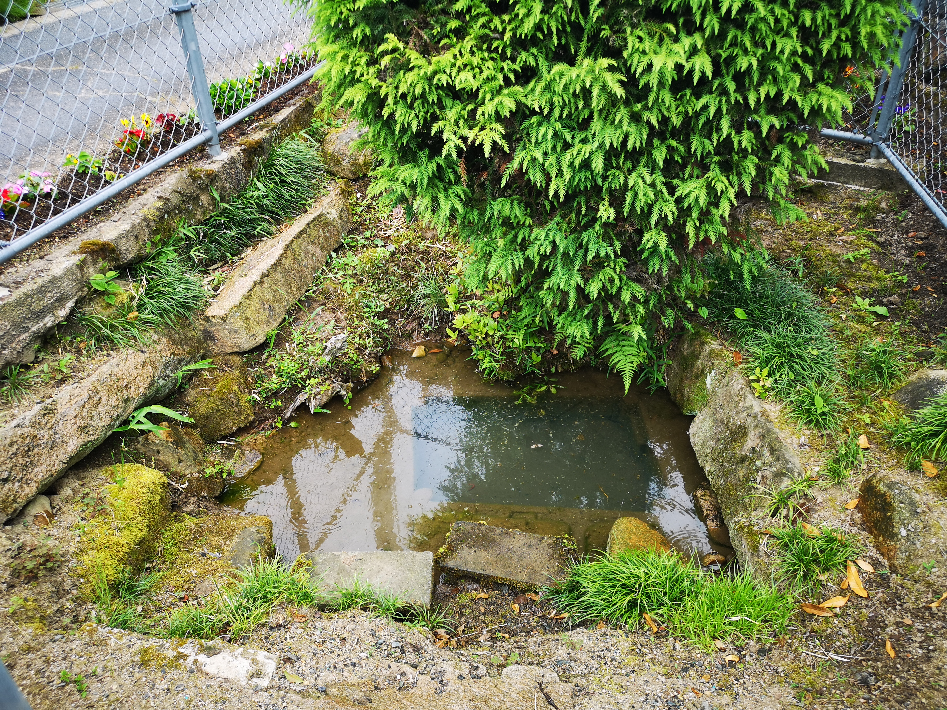 京丹後市峰山町苗代にある「清水戸」。豊受大神が五箇ではじめて農耕をした際に籾を浸した場所であるとされる。